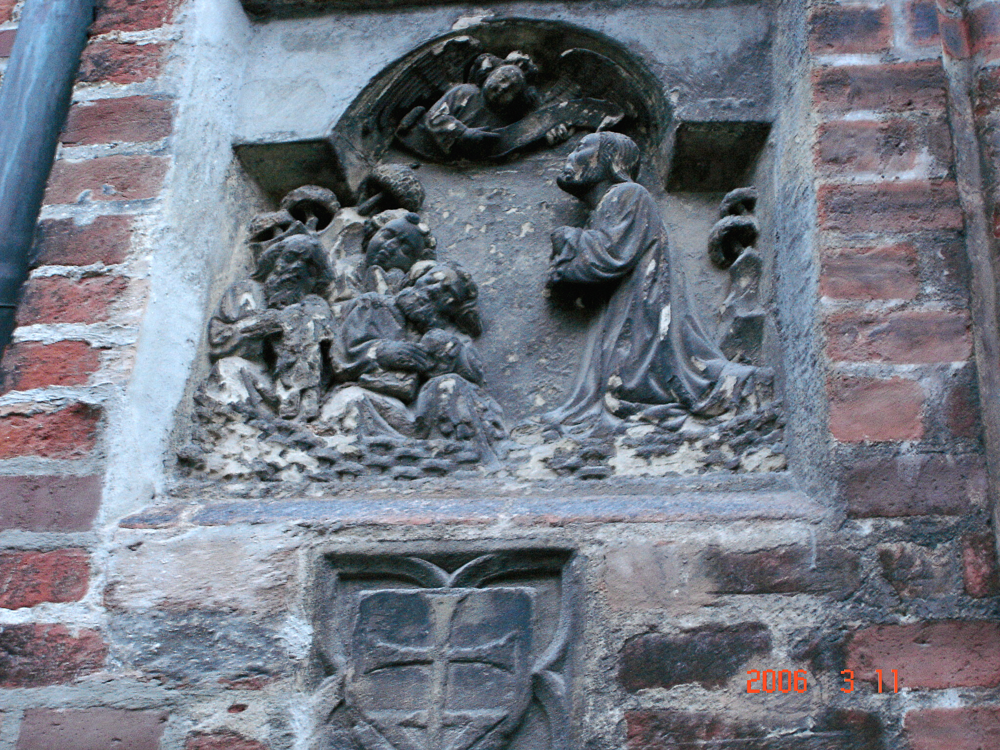 Asylzeichen, links des Sixtusportales.